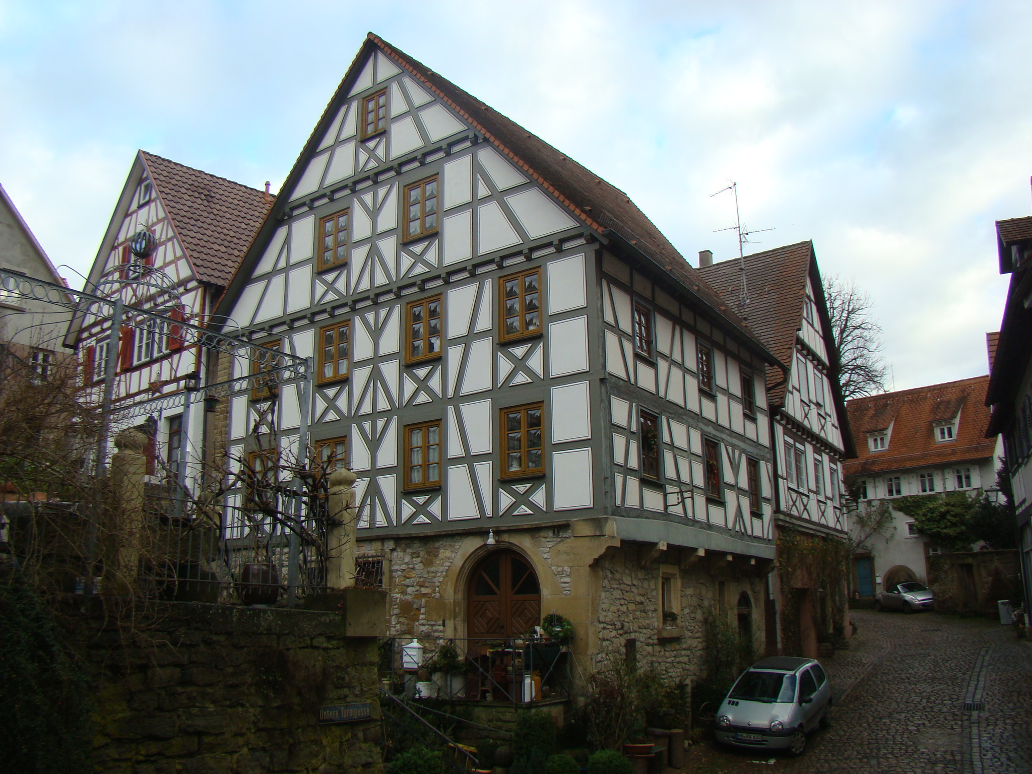 Schwibbogengasse 5 (Bad Wimpfen)